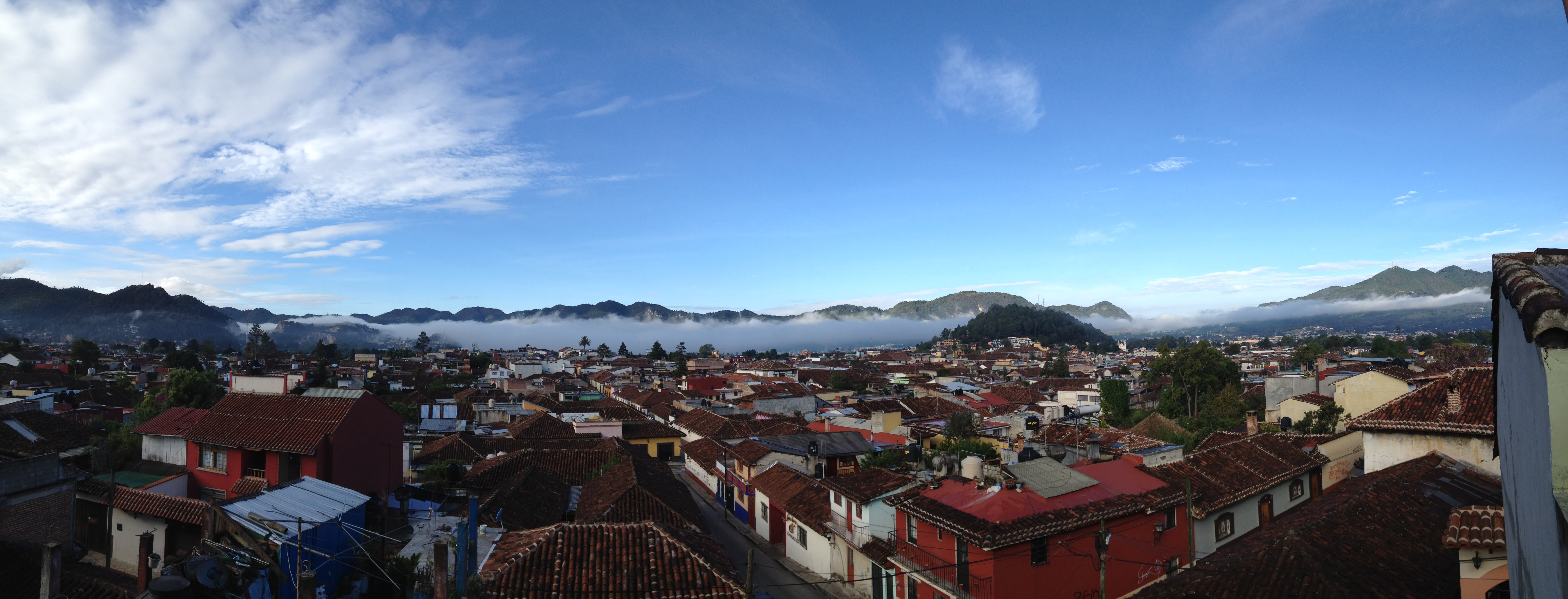 Vista panorámica de San Cristóbal de Las Casas (México) desde el barrio de El Cerrillo hacia el sur.